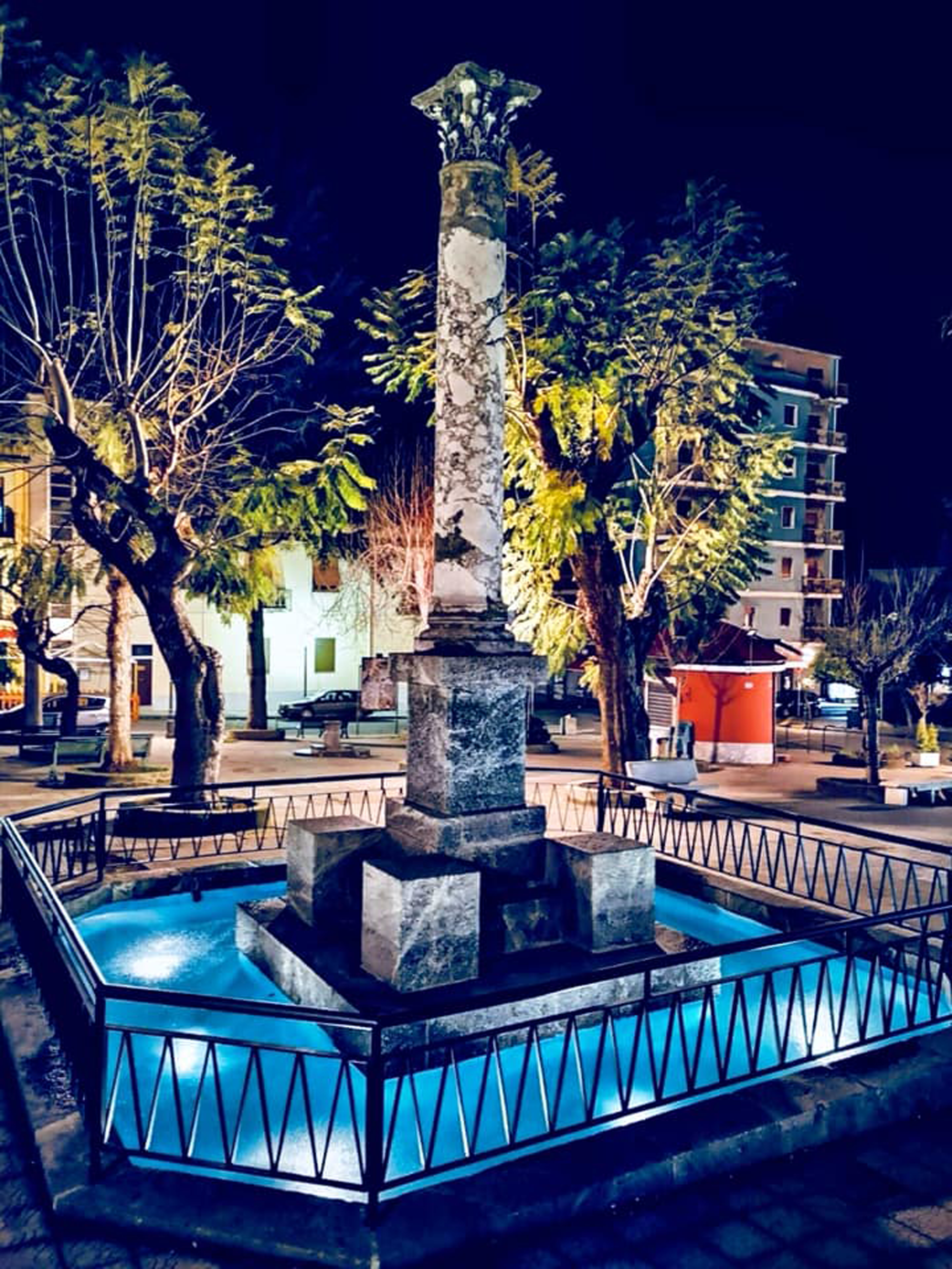 colonna romana proveniente dai ruderi dell'antica Tauriana, collocata in piazza Matteotti a Palmi